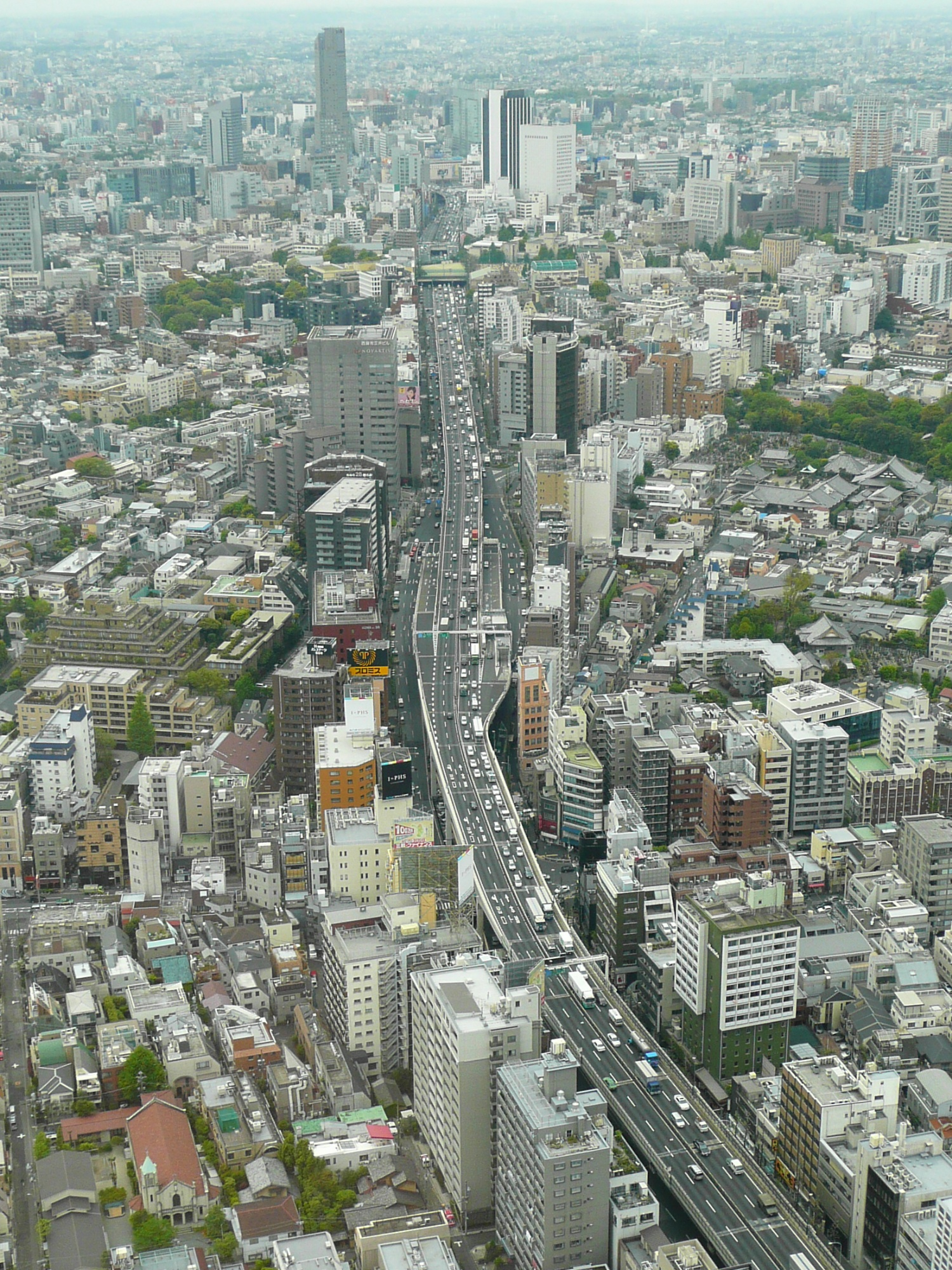 六本木ヒルズから望む首都高速3号渋谷線（渋谷方面）